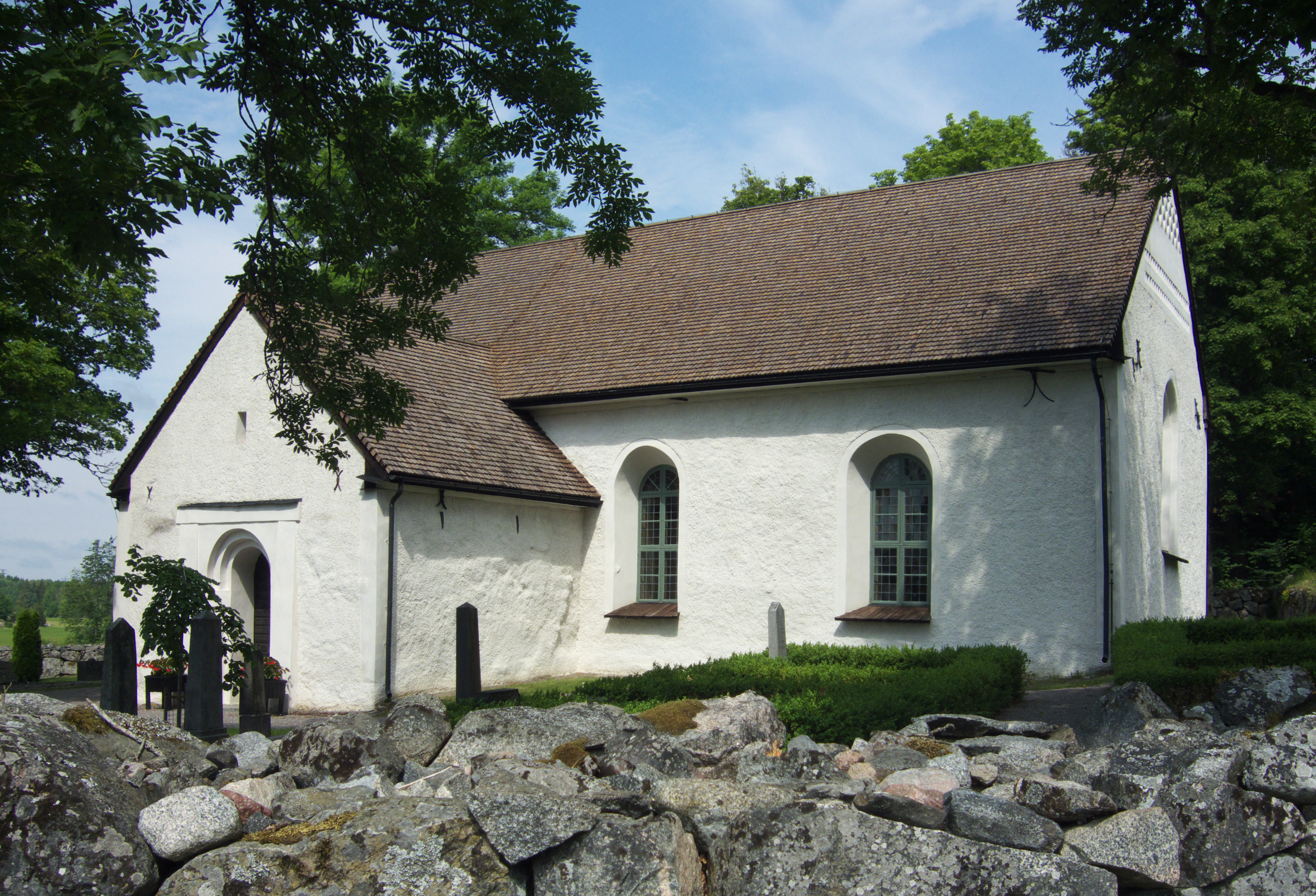 Fröslunda kyrka, Uppland